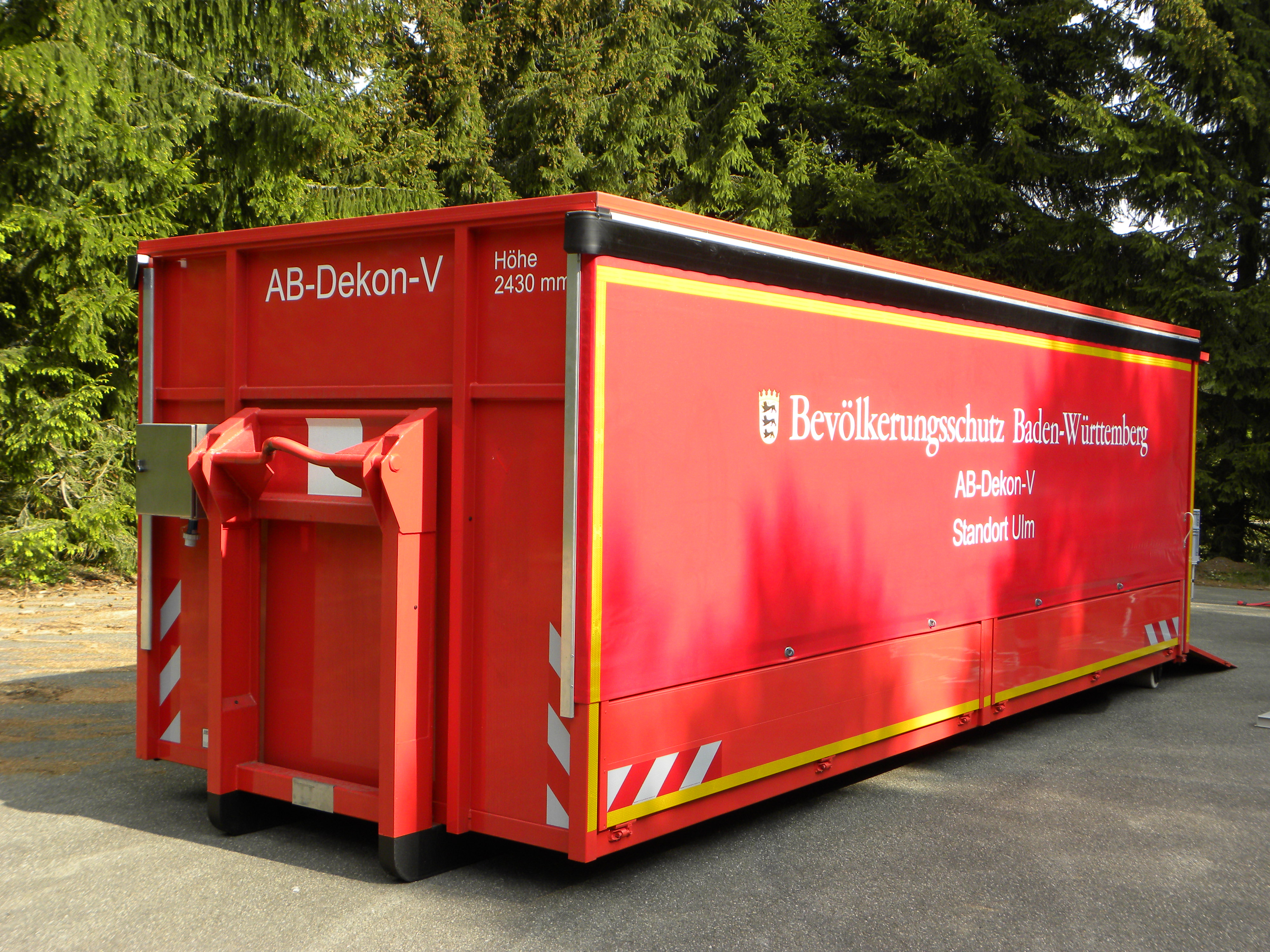 Abrollbehälter "Dekontamination von Verletzten" des Bevölkerungsschutzes Baden-Württemberg am Standort Ulm